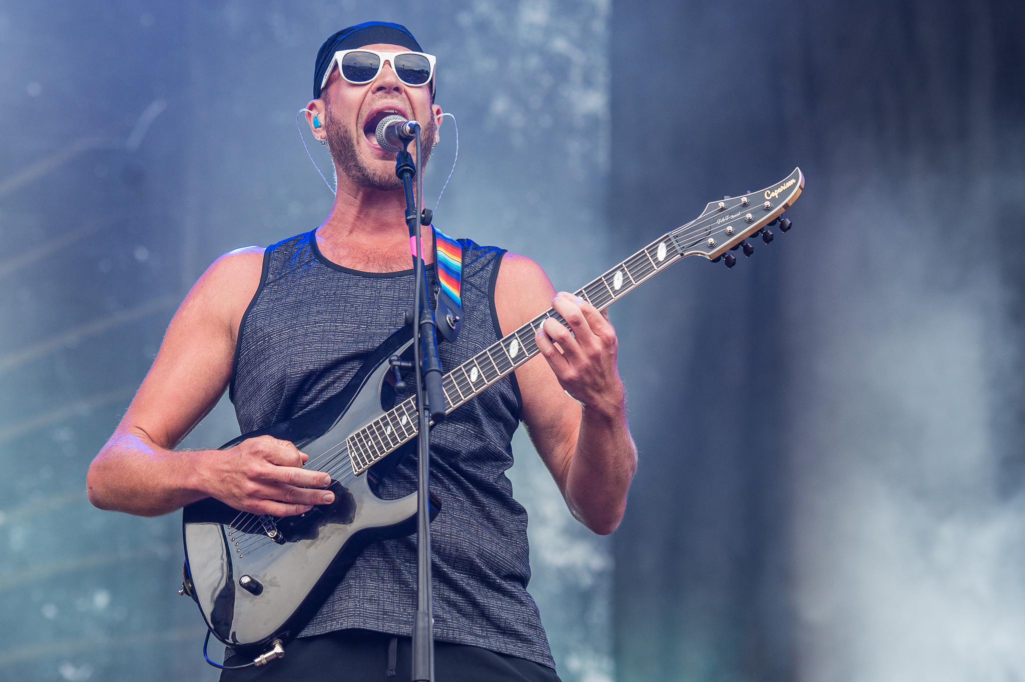 ARGO-Konzerte,Beck's Park Stage,Festival,Killswitch Engage,Konzert,Livekonzert,Livemusik,Musik,RiP,Rock im Park 2016